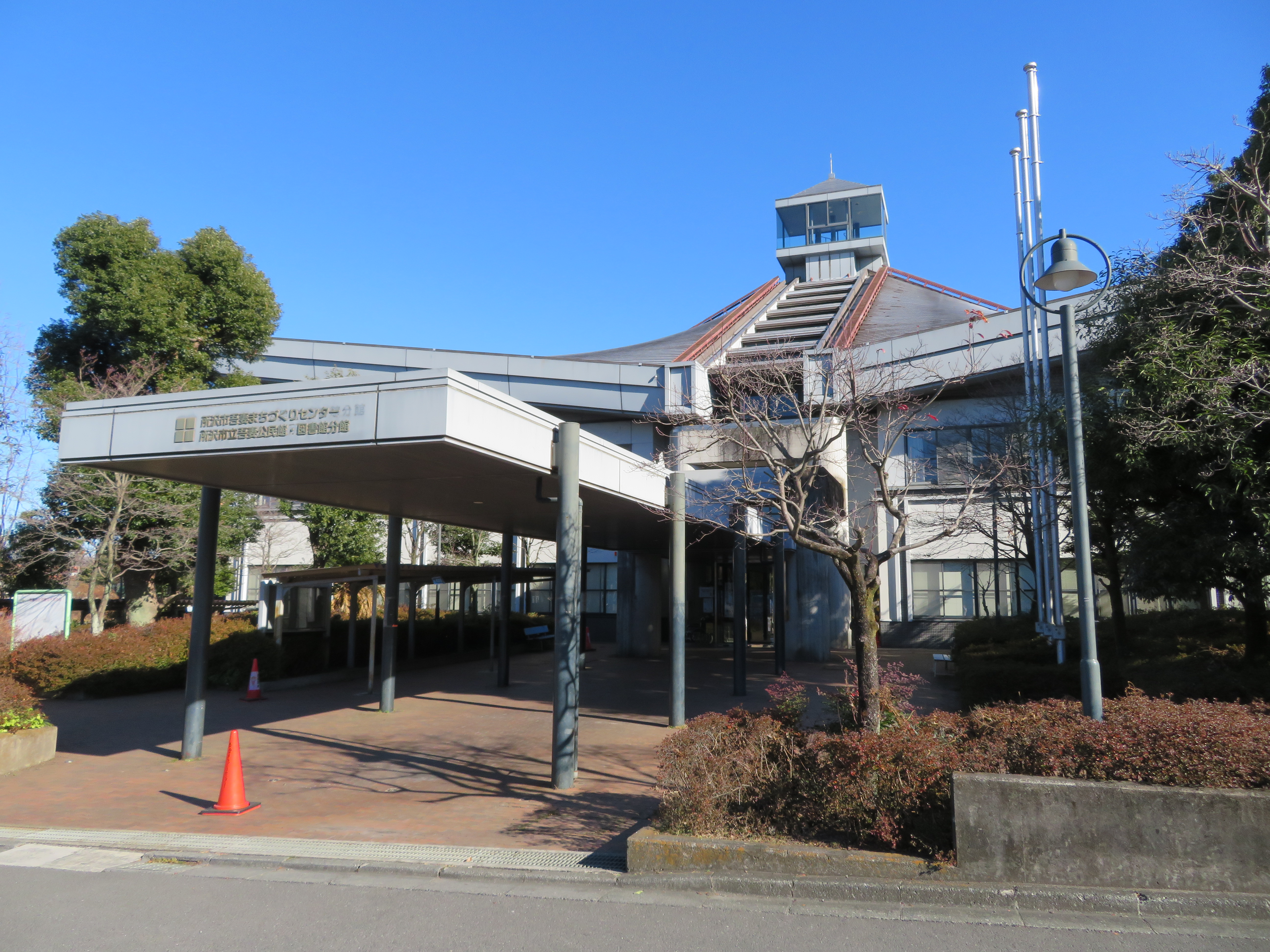 埼玉県所沢市に所在する所沢市吾妻まちづくりセンター Canon PowerShot SX720 HS